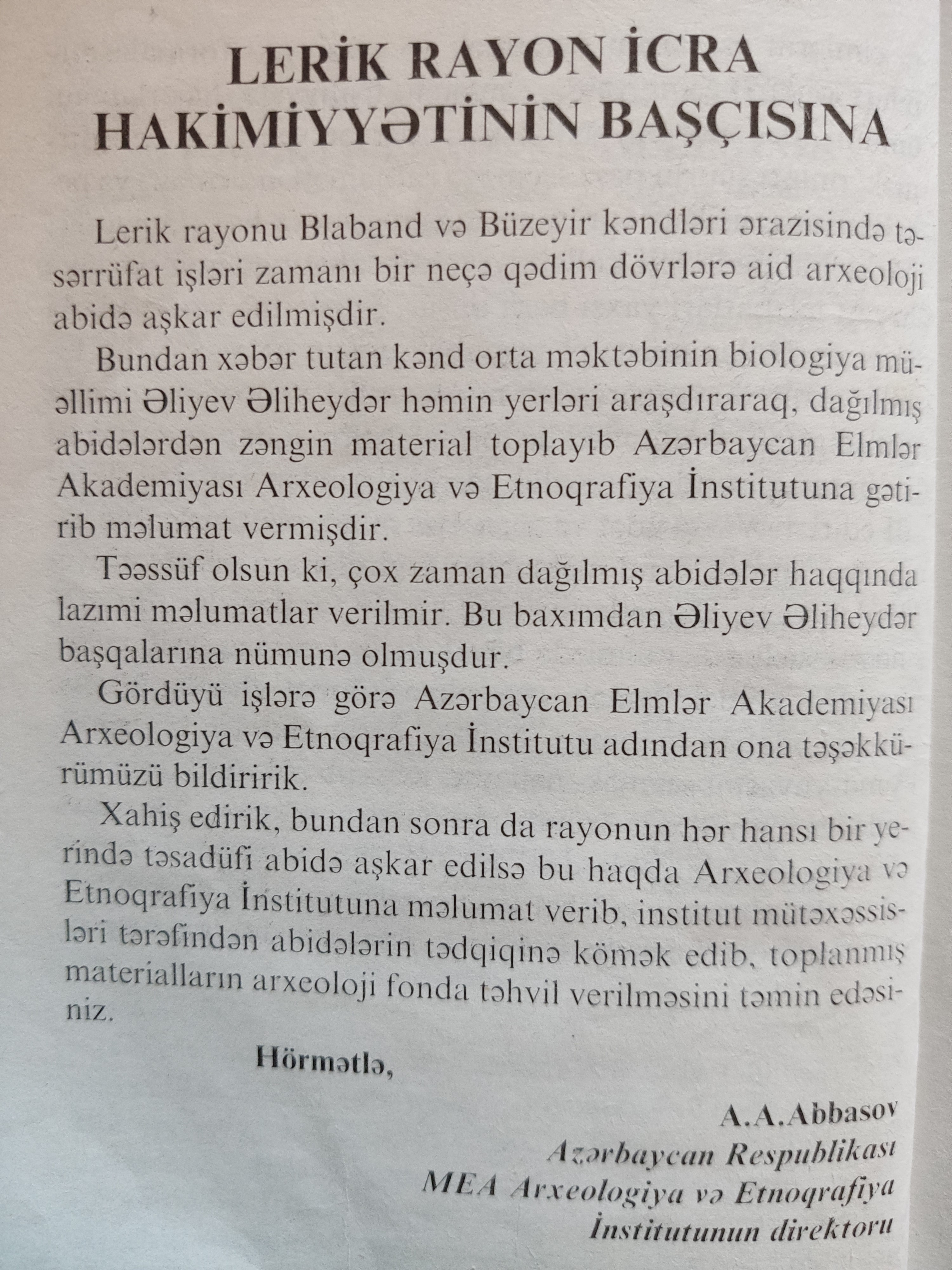 Bu təşəkkür məktubu Arxeologiya və Etnoqrafiya İnstitutunun direktoru, professor Arif Abbasov tərəfindən Lerik rayon icra hakimiyyətinə göndərilmişdir.